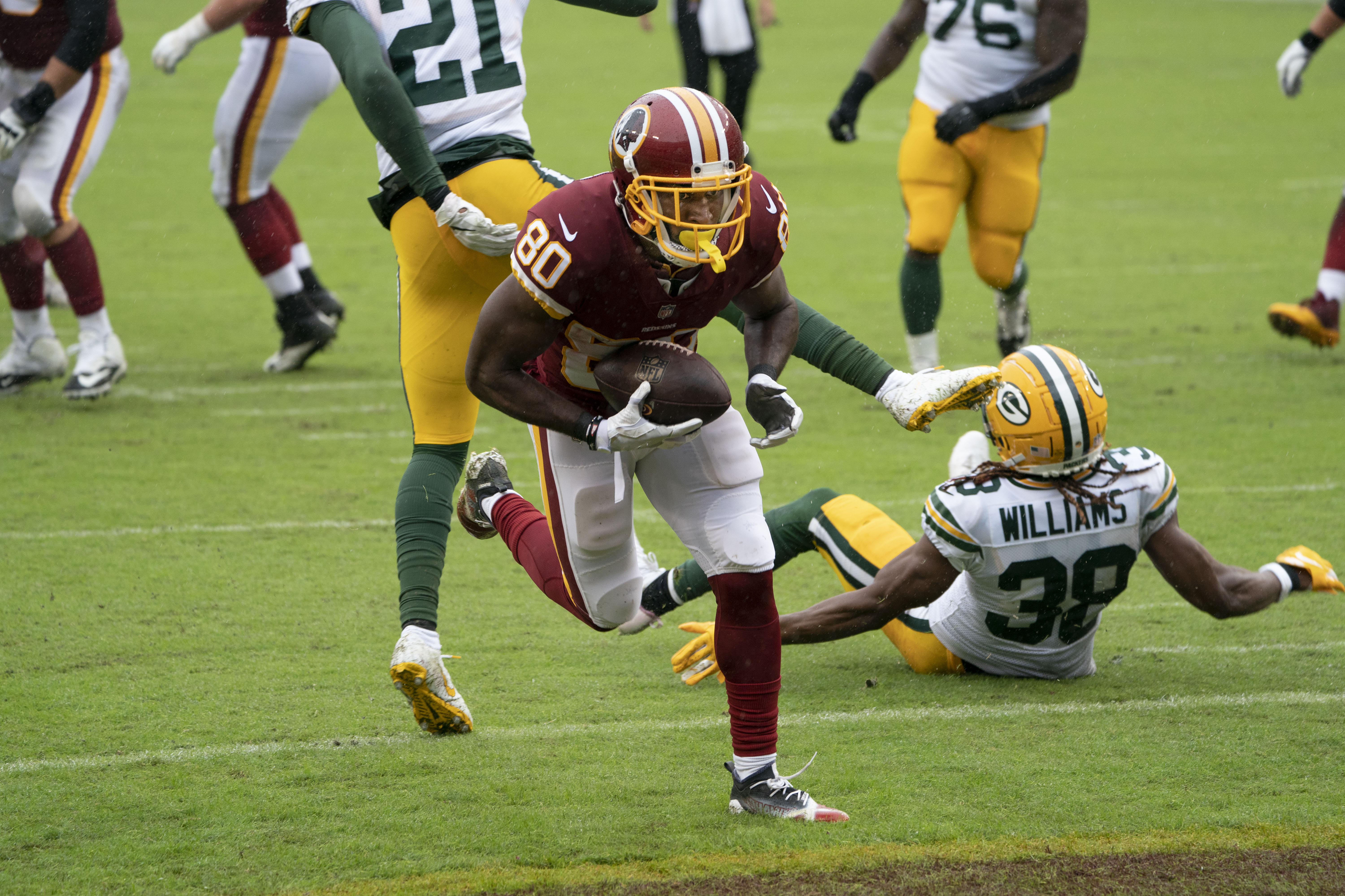 Packers at Redskins 09/23/18